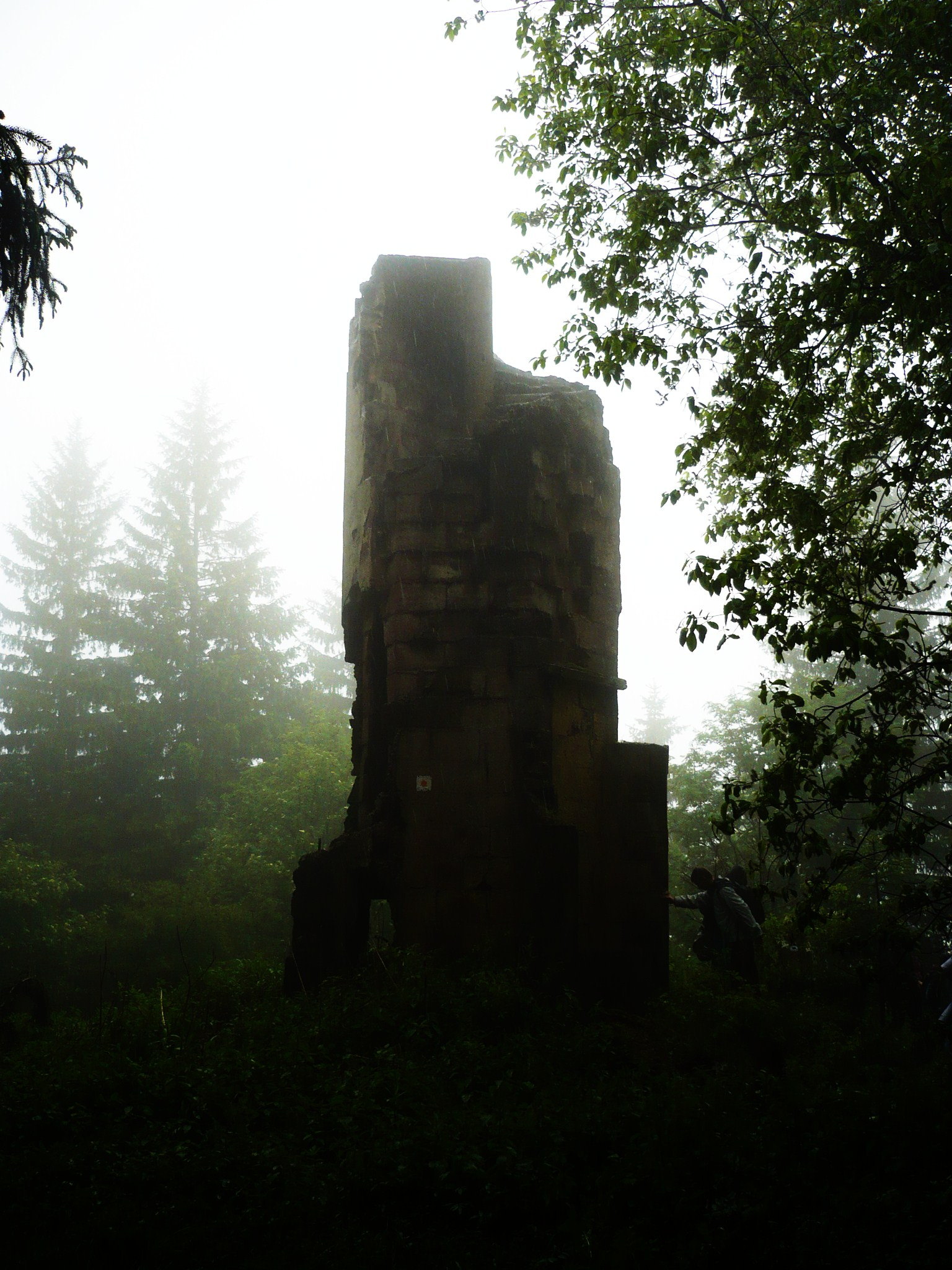 Włodzicka Góra. Wieża